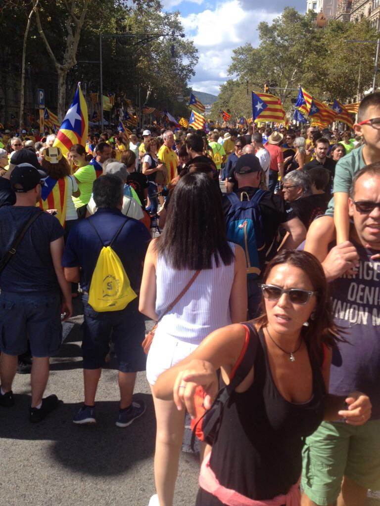 La diada del sí rally 15:30